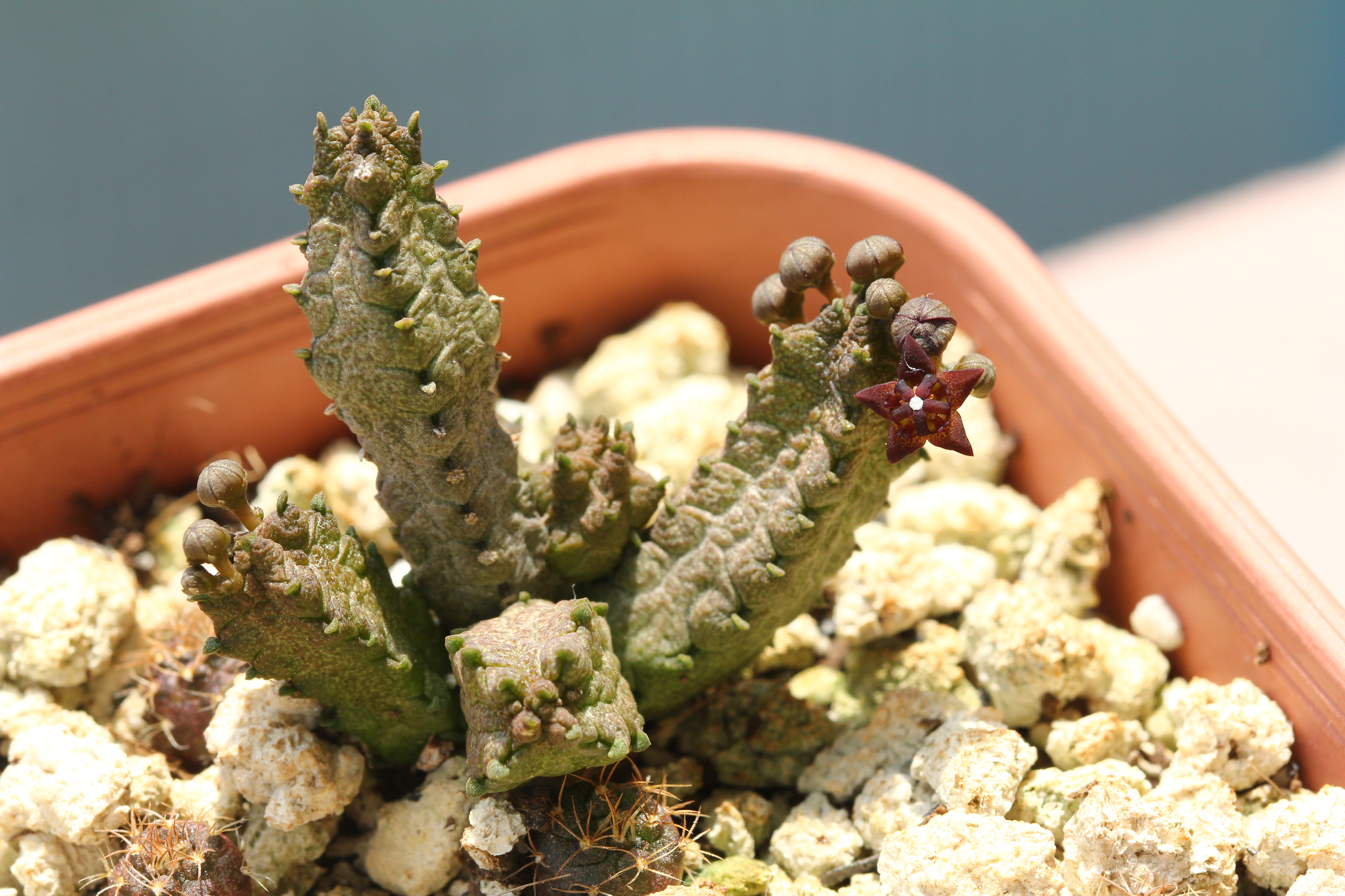 凝蹄玉属。